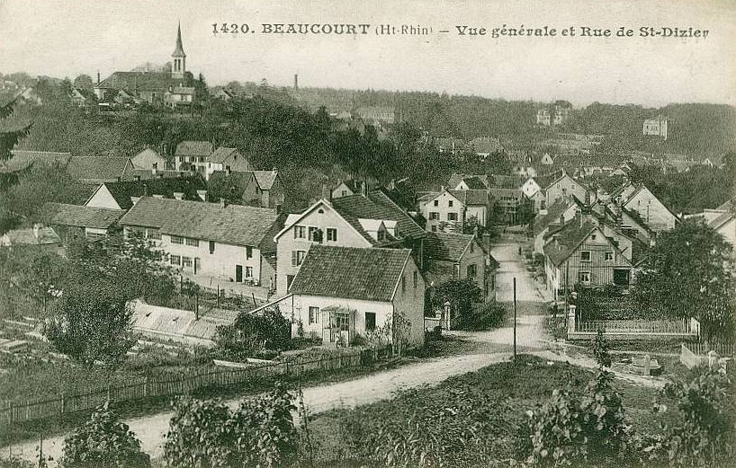 Vue générale sur la rue de St-Dizier à Beaucourt